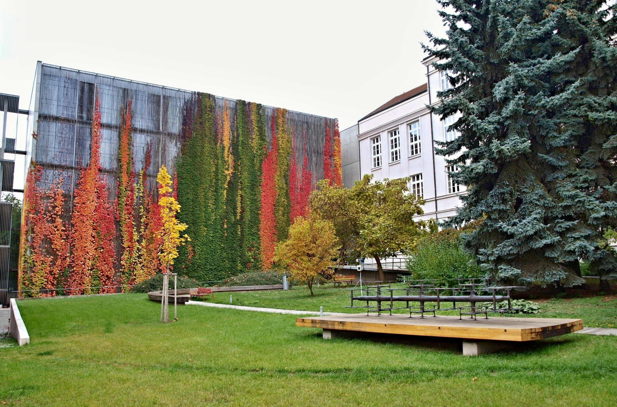 Filosofická fakulta MUNI, Brno